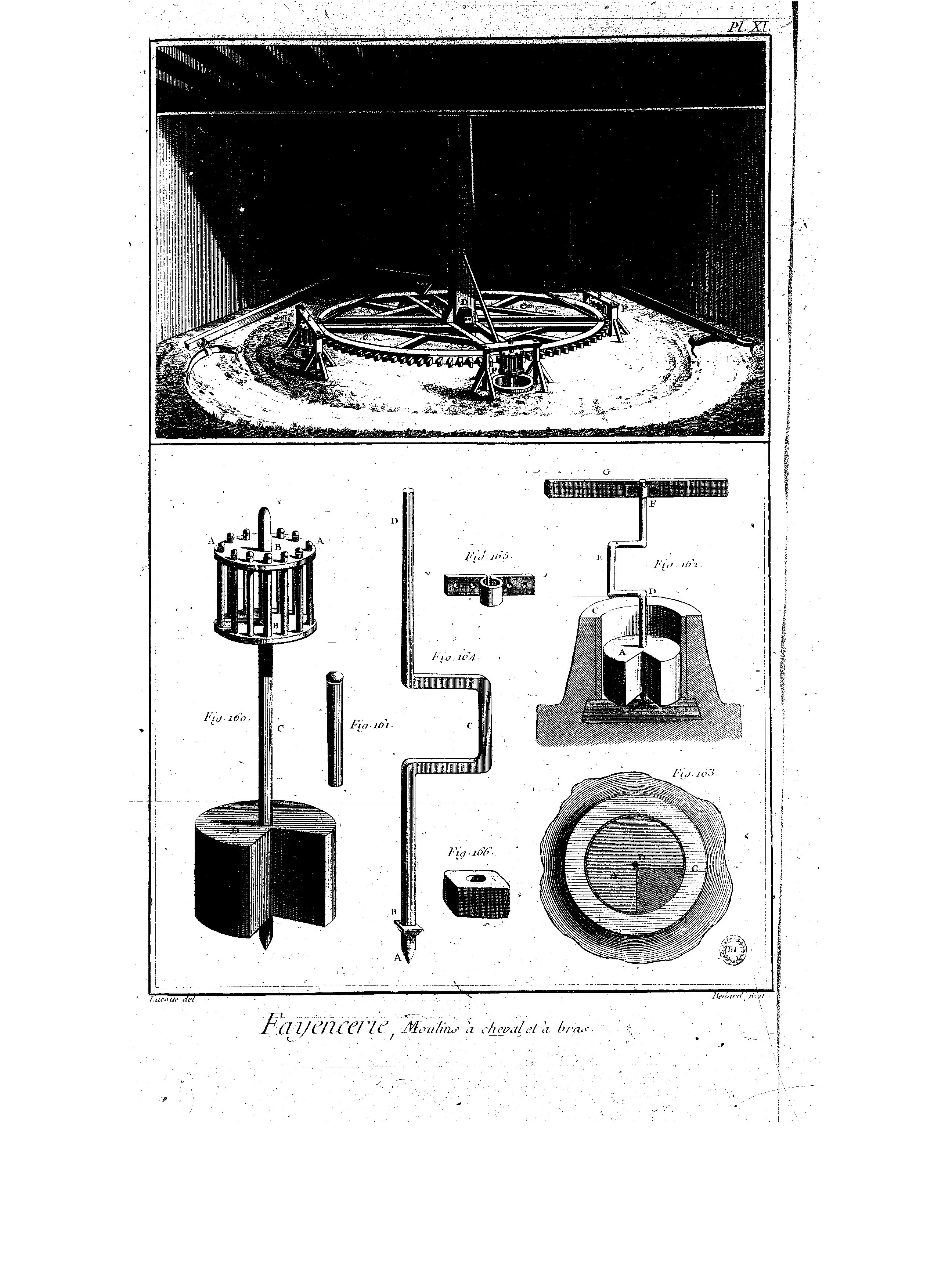 Planches de l'Encyclopédie de Diderot et d'Alembert, volume 3